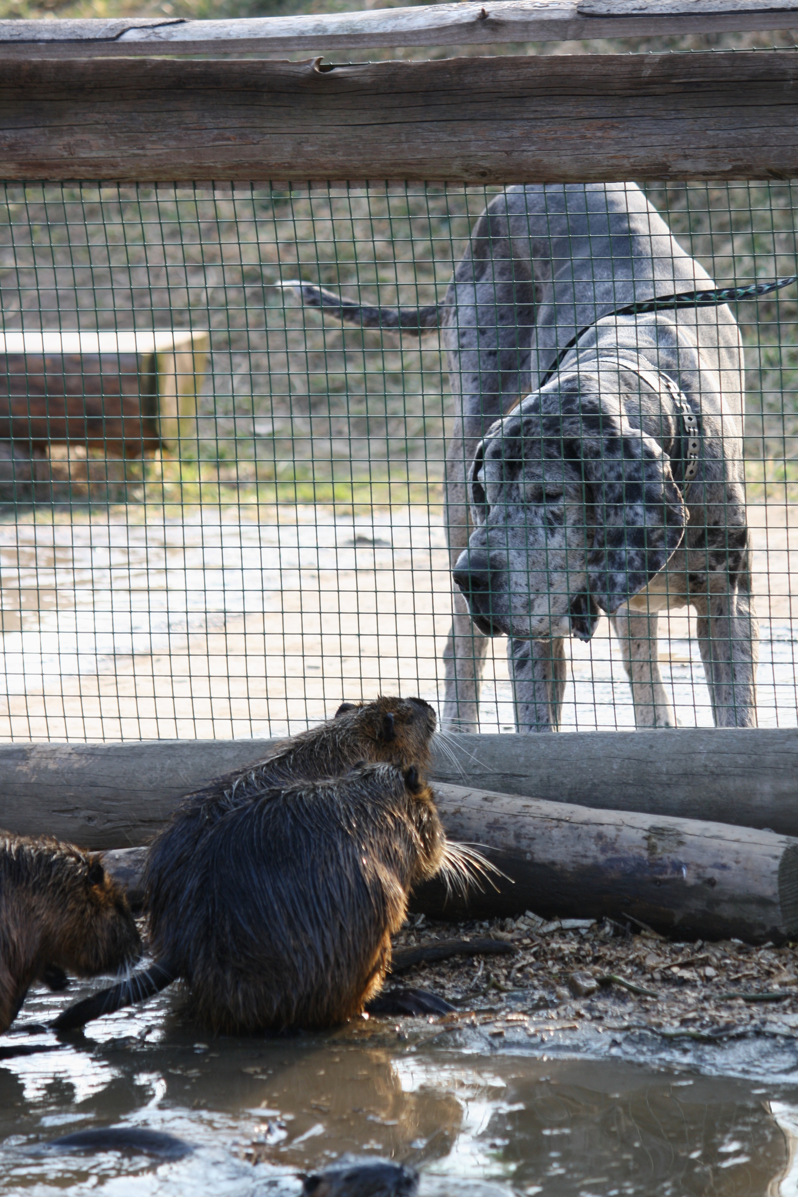 Pražská zoologická zahrada - nutrie a pes v dětské zoo